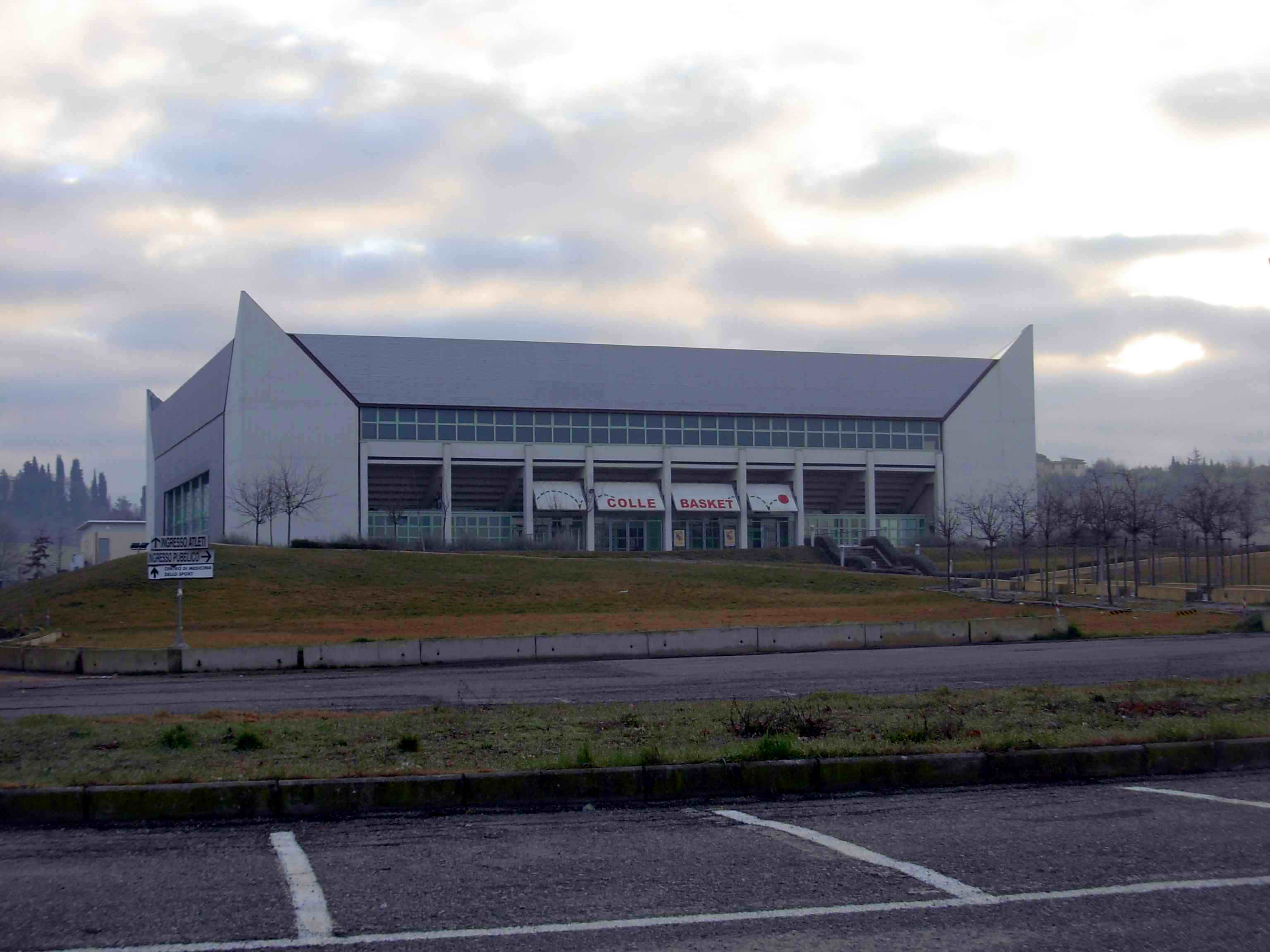 Colle di Val d'Elsa (Siena - Italia): il Palazzetto dello Sport